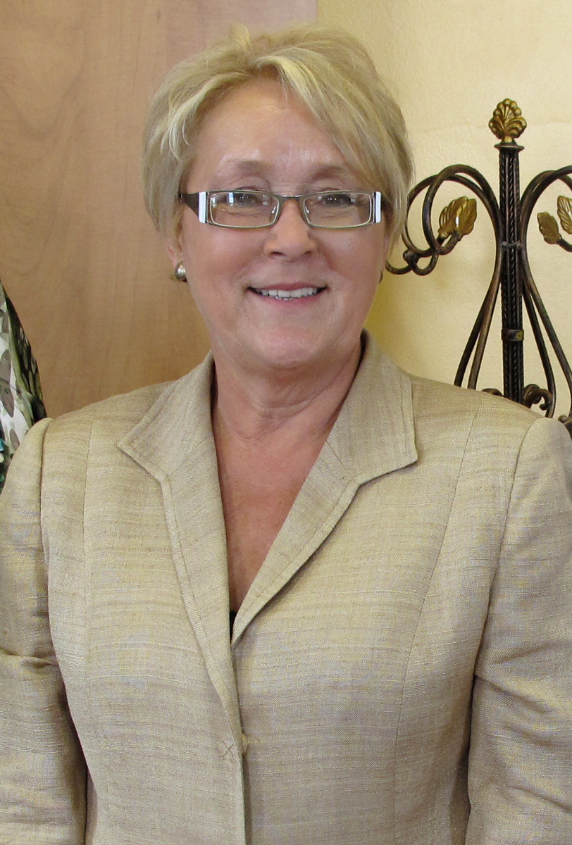 Pauline Marois au Cégep de Chicoutimi